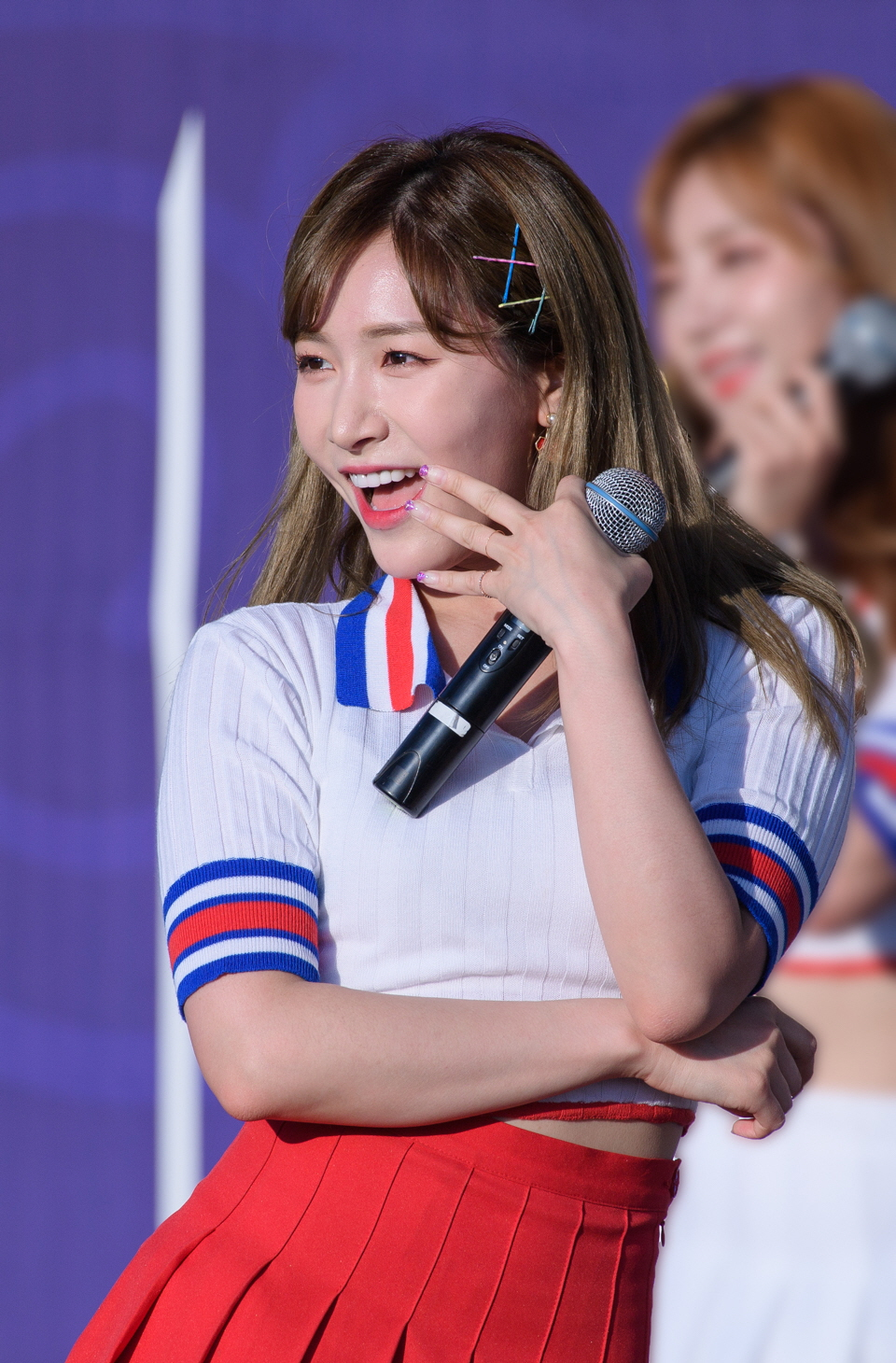 170611 라붐 수원 세계문화축제